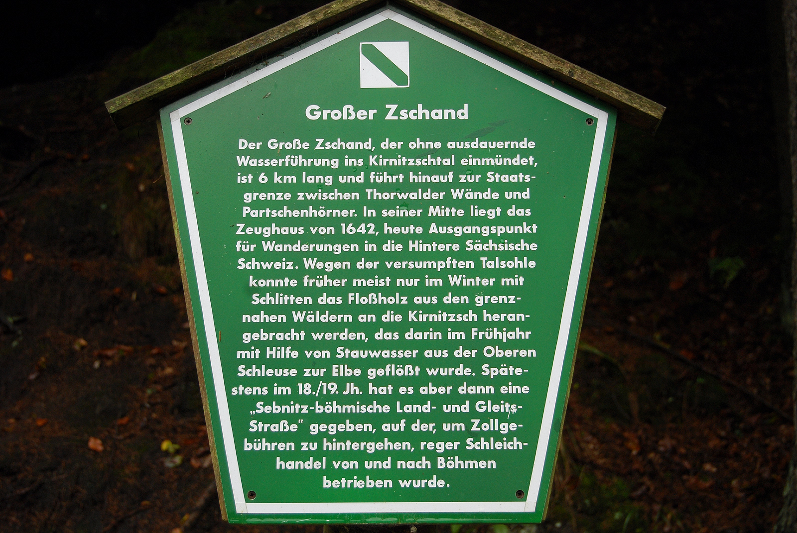 Hinweisschild ´Grosser Zschand` an der Wehranlage der Neumannmühle im Kirnitzschtal Sächsische Schweiz.